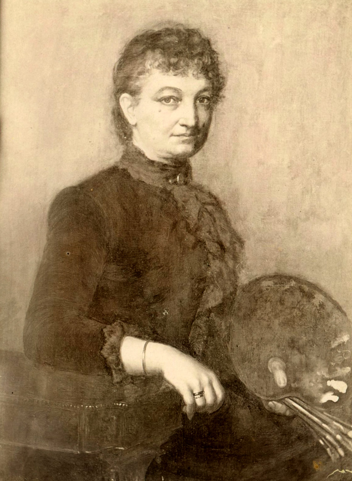 Self-portrait